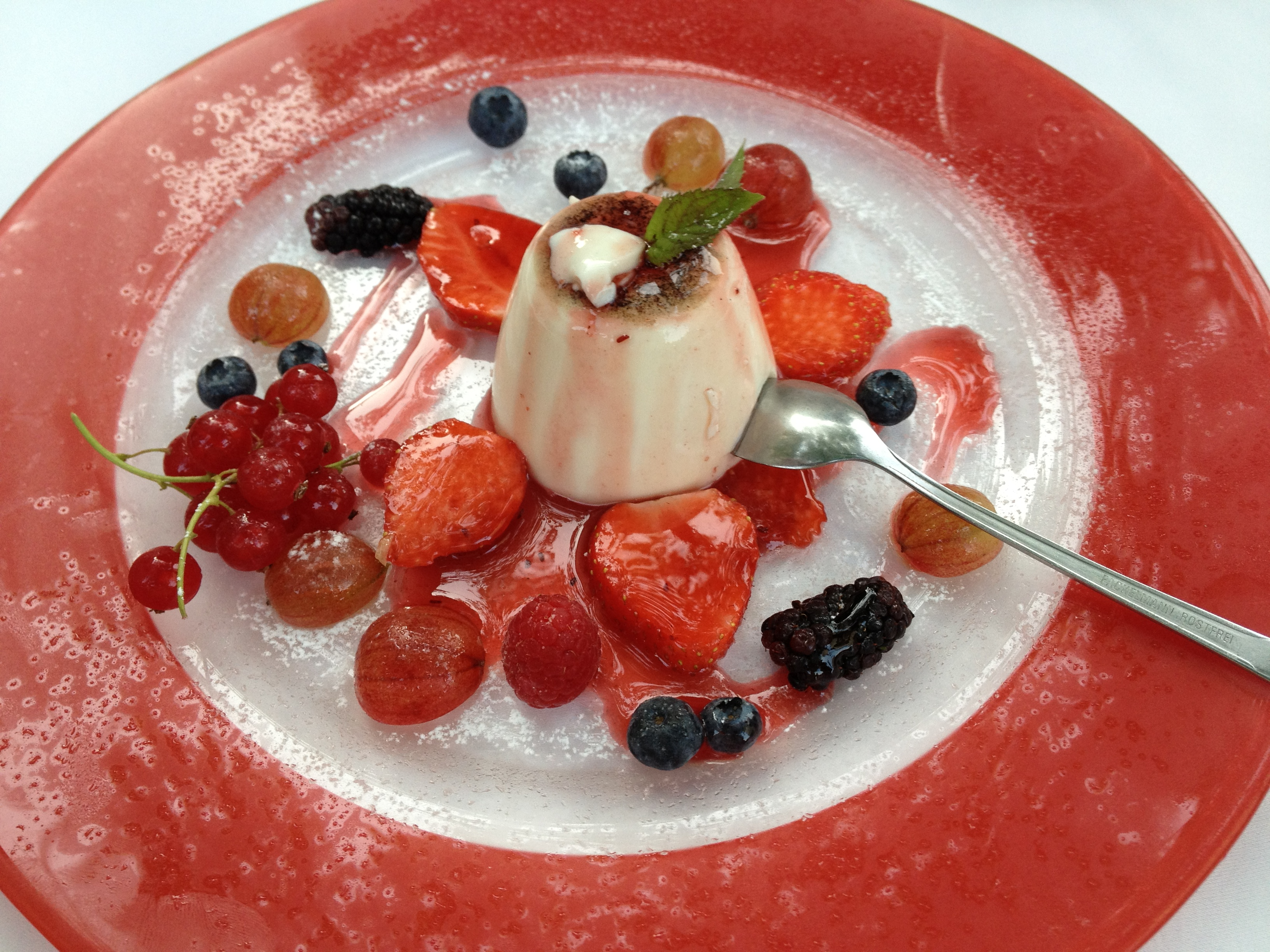 Bildinhalt: Panna cotta mit Obst und Löffel auf einem Teller mit rotem Rand Aufnahmeort: Baden-Baden, Deutschland